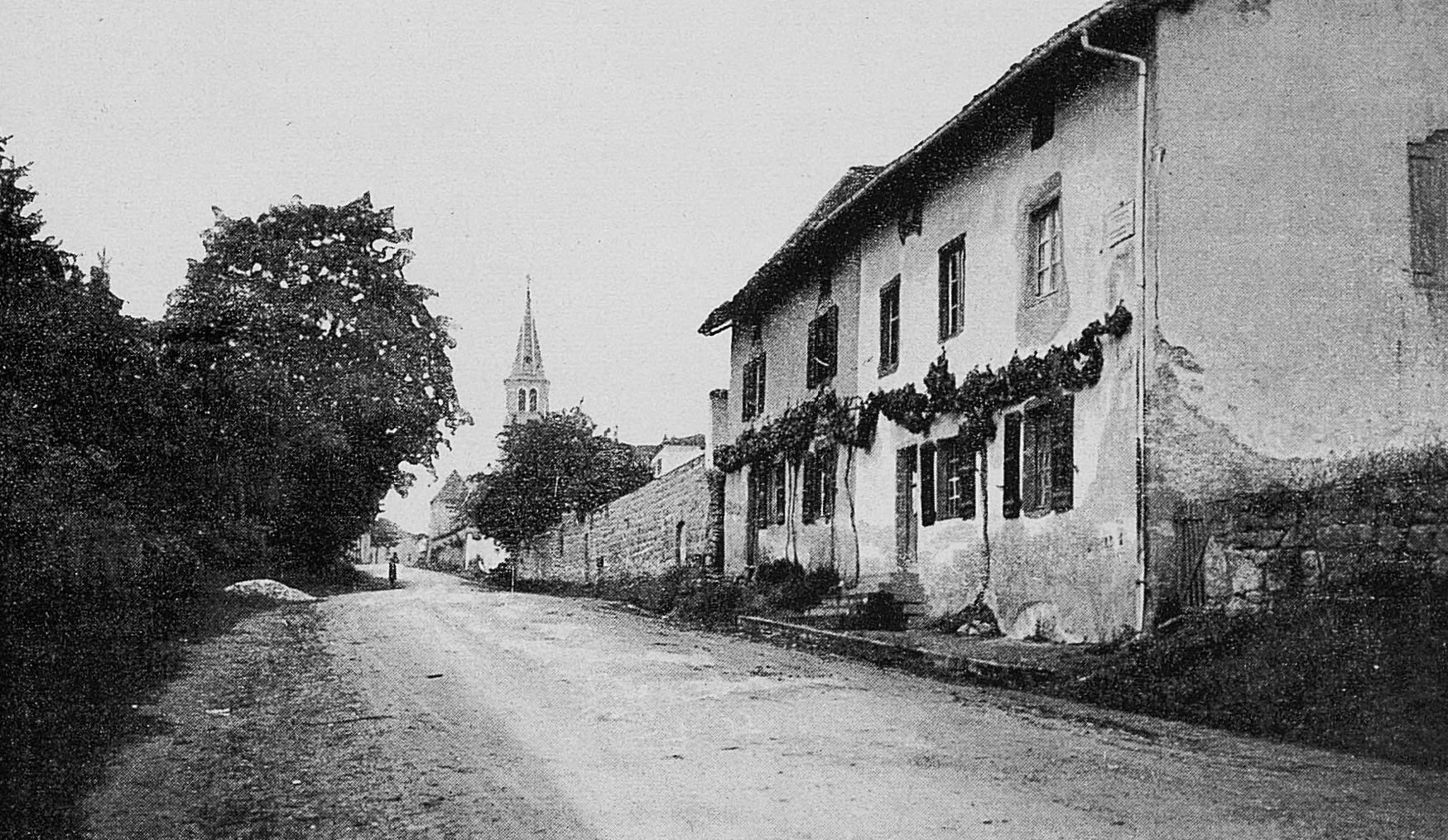 Dictionnaire illustré des communes du département du Rhône. Tome 1 / par MM. E. de Rolland et D. Clouzet.